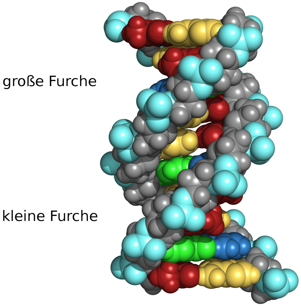 Ausschnitt aus einem Kalottenmodell eines DNA-Moleküls, mittels Pymol generiert.